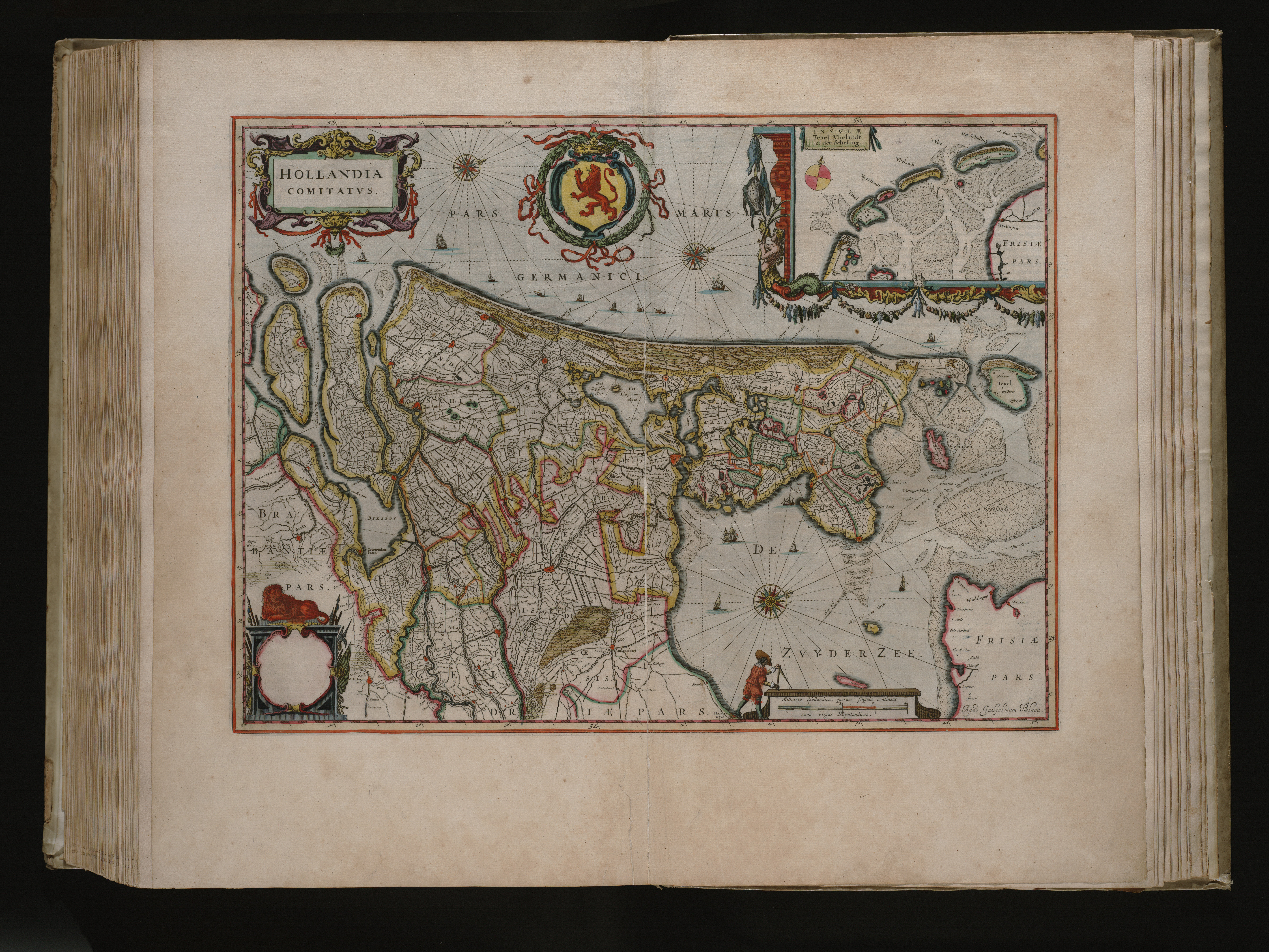 Toonneel des Aerdriicx, ofte Nieuwe Atlas, dat is beschryving van alle landen. Nu nieulycx uytgegeven, door Wilhelm en Iohannem Blaeu - 254